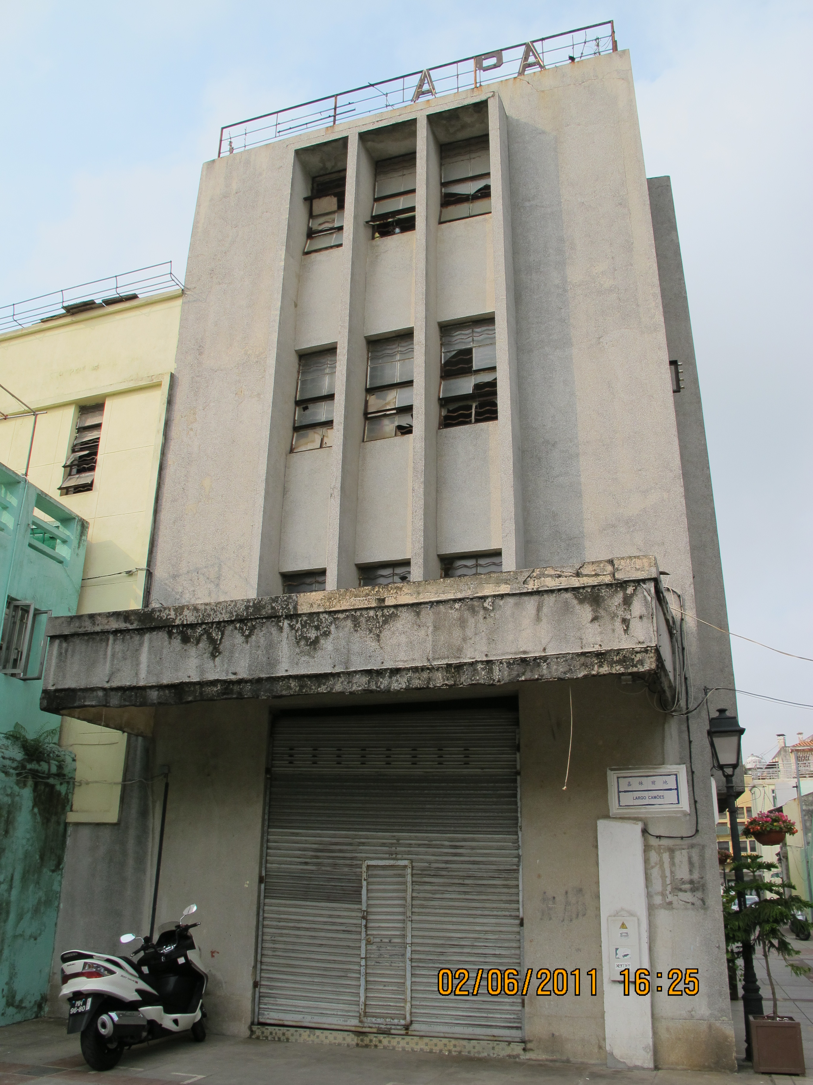 中文（香港）: 澳門海寶戲院